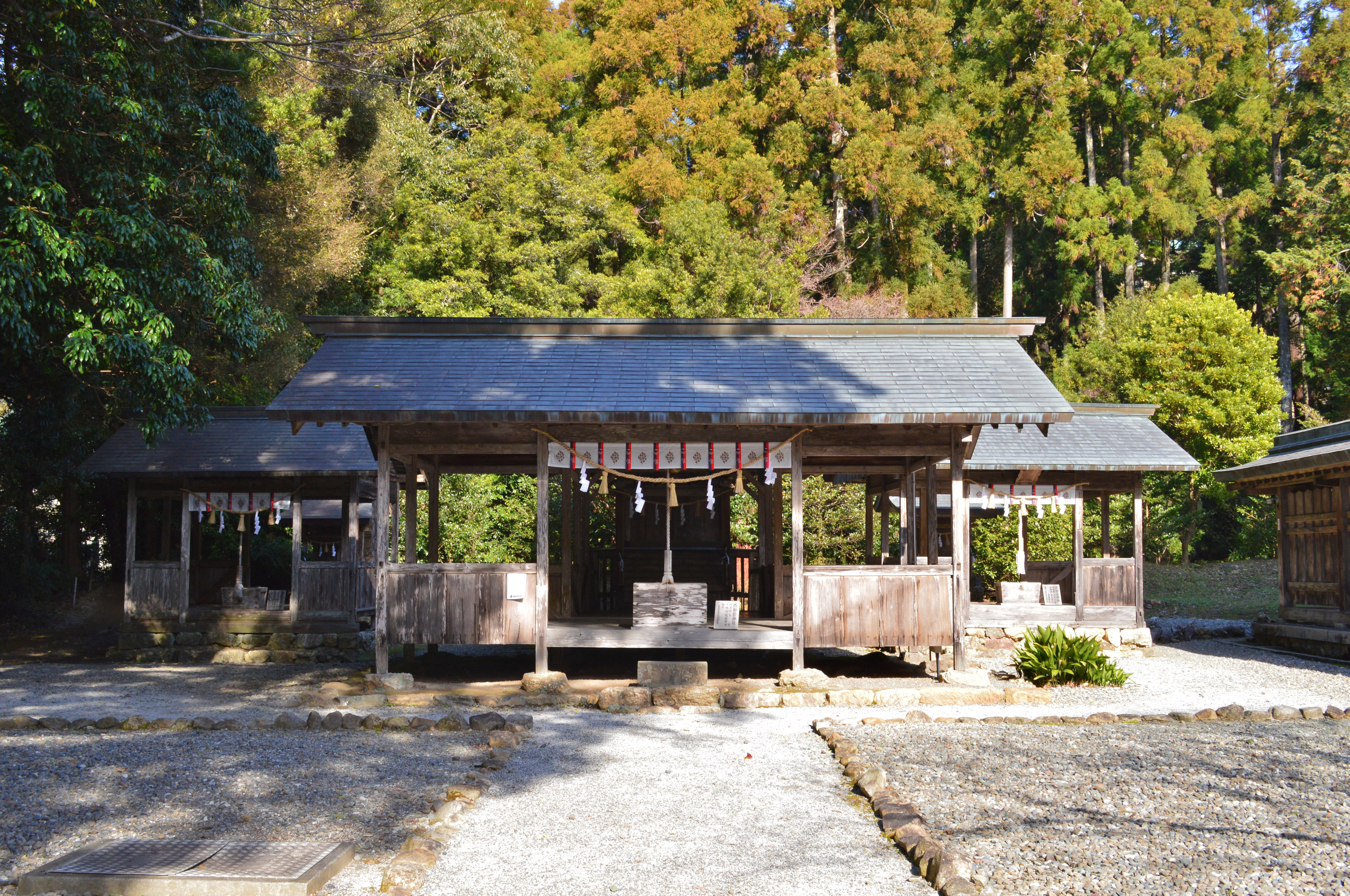 土佐神社 境内摂社